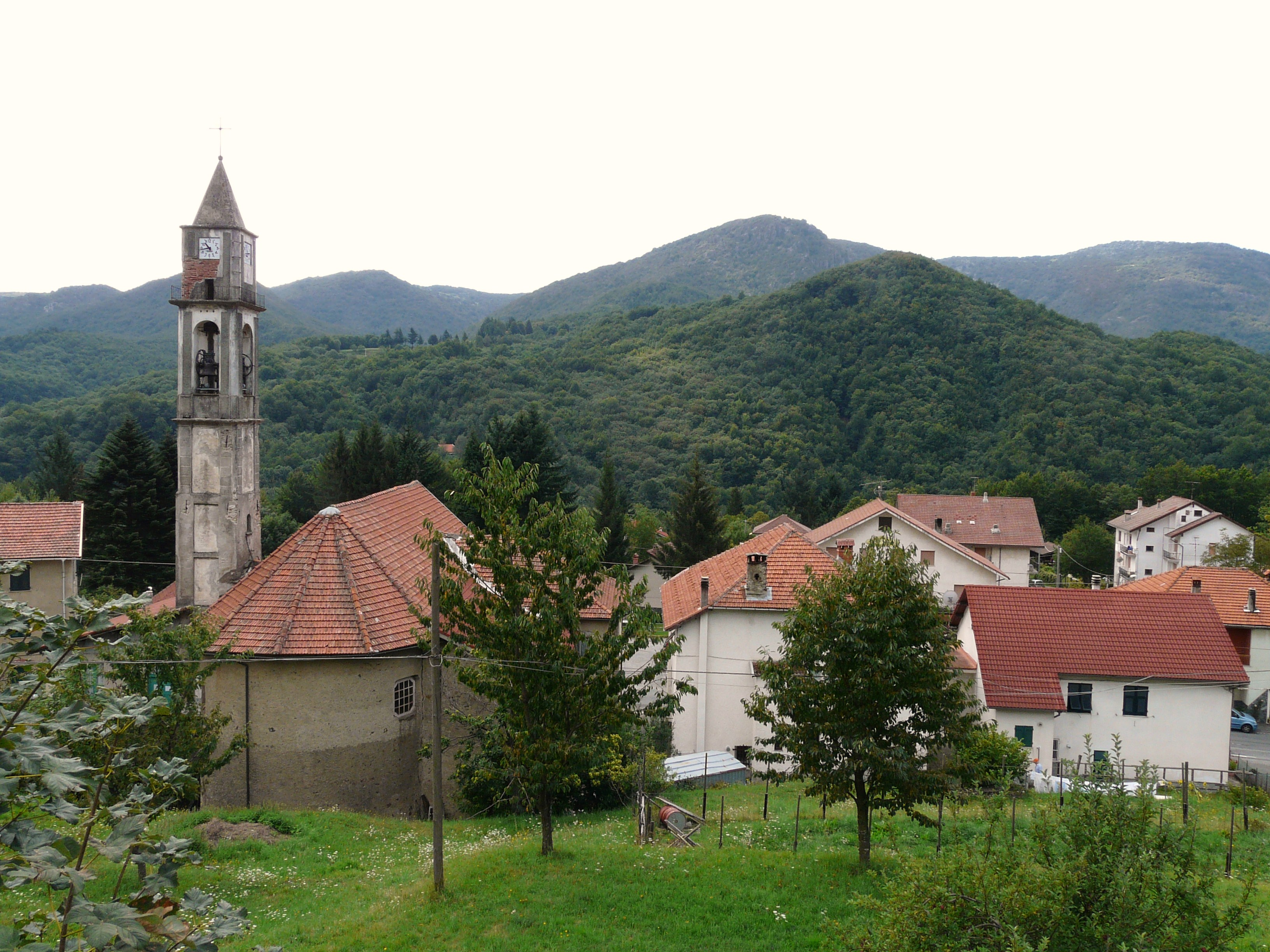 Panorama di Vara Inferiore e della chiesa di San Gualberto, Urbe, Liguria, Italia